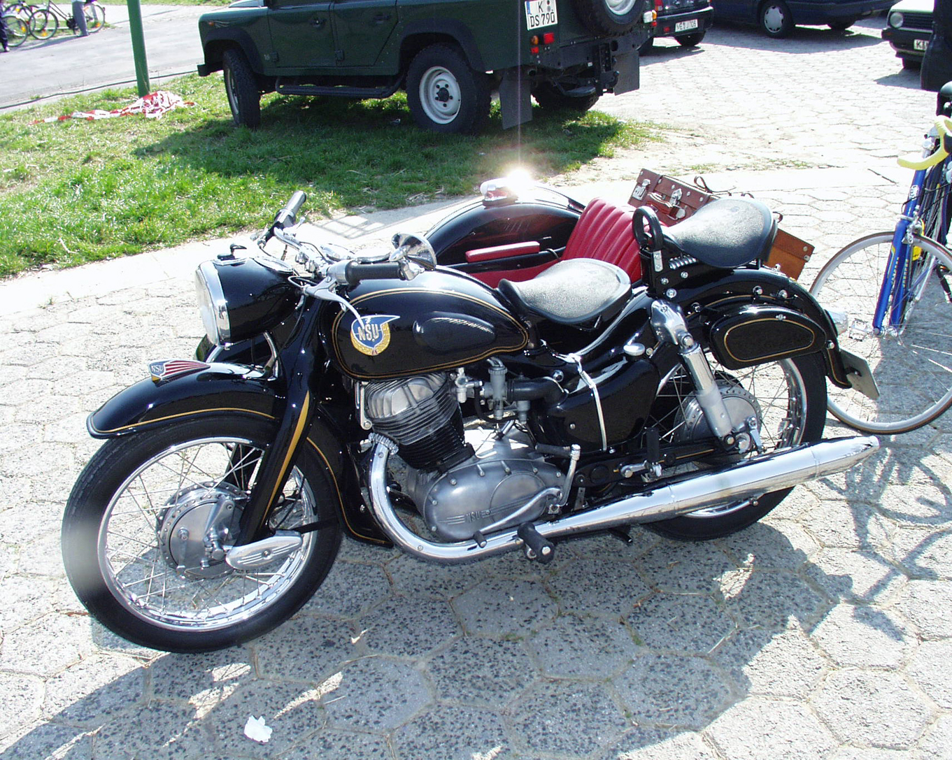 NSU Max mit Beiwagen